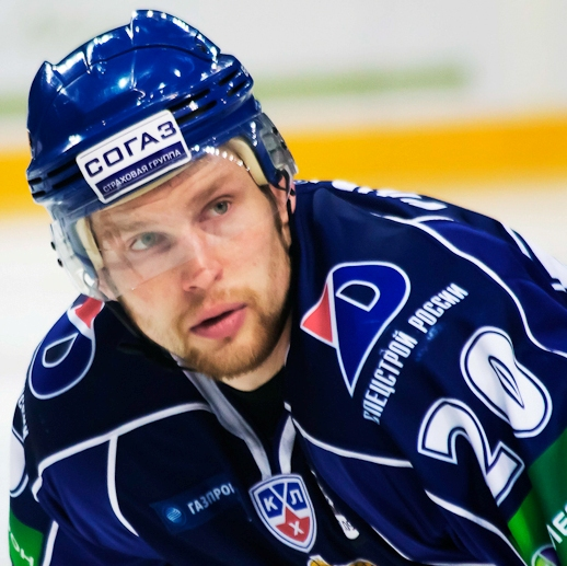 Петр Врана в матче КХЛ «Амур» — «Торпедо» (Нижний Новгород) 3 ноября 2011 года